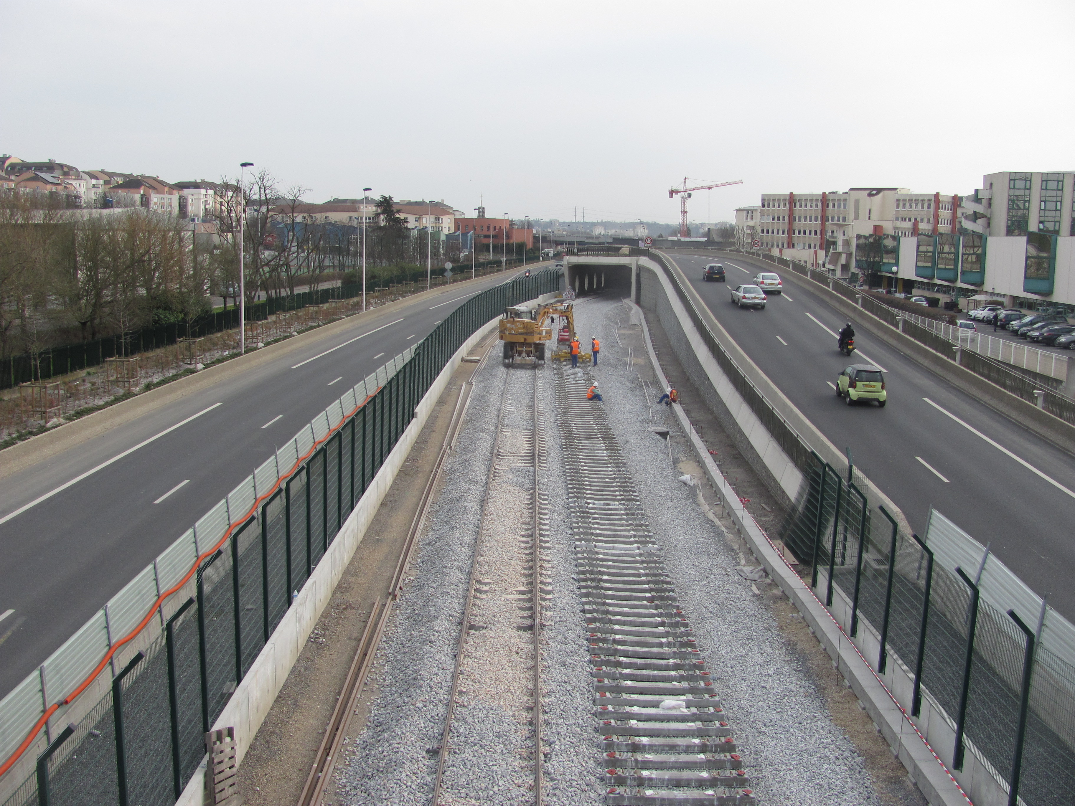 Pose des voies avant le saut de mouton